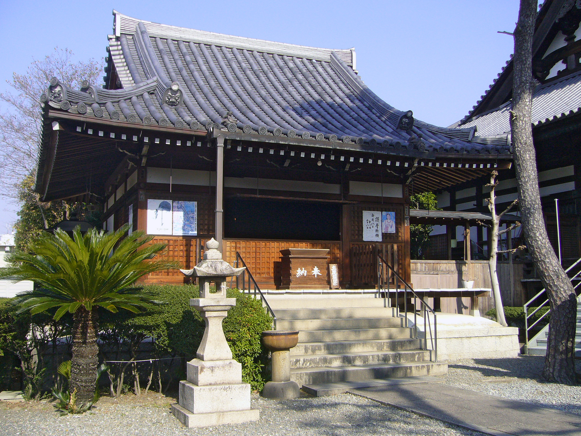 Fujiidera in Fujiidera, Osaka, Japan